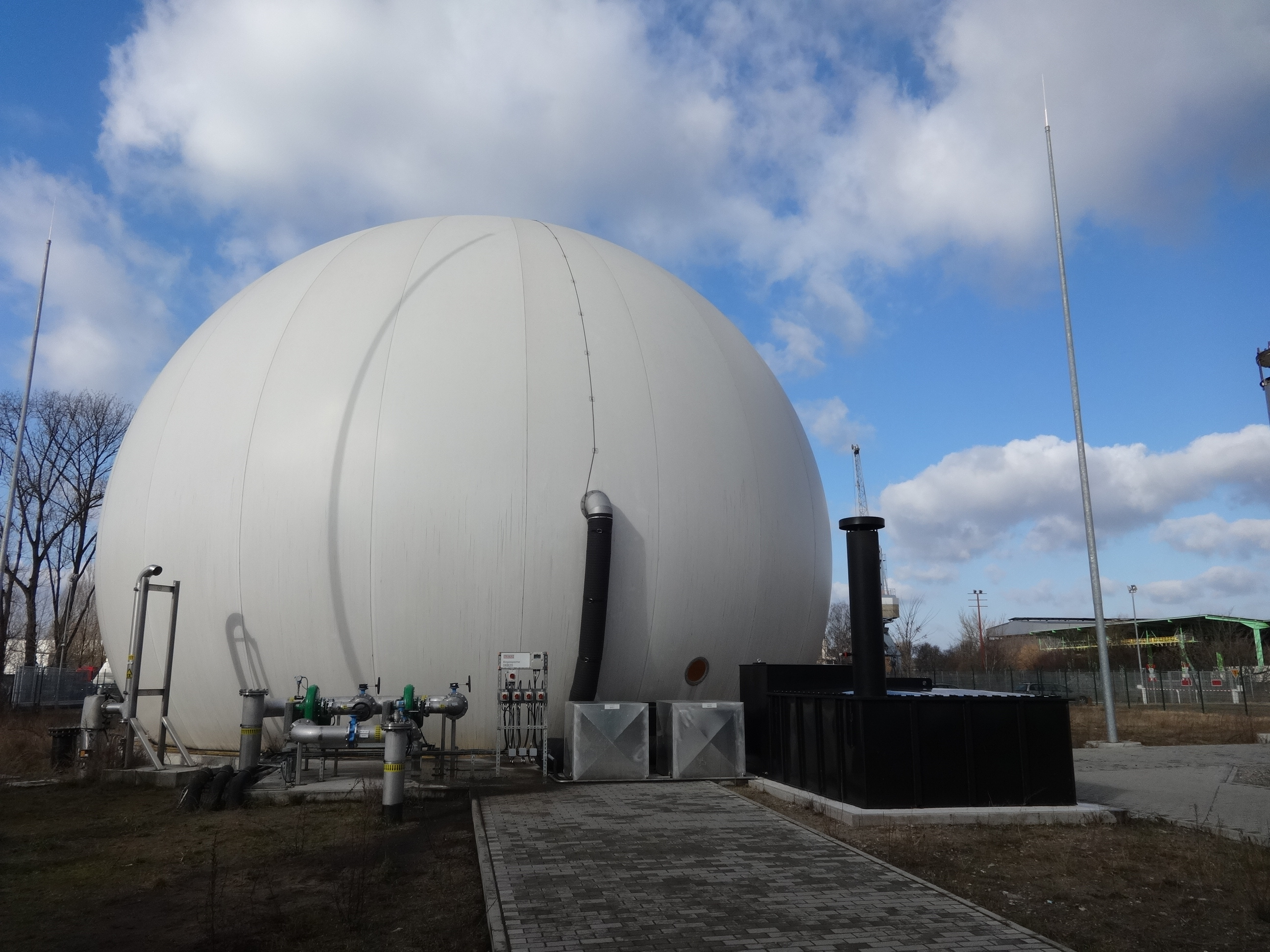 Die Biogasanlage Berlin erzeugt seit 2013 aus rund 60.000 Bioabfall vorzugsweise aus Berliner Privathaushalten Biomethan, in dem Biomasse vergärt wird. Sie befindet sich in der Berliner Ortslage Ruhleben im Ortsteil Westend.